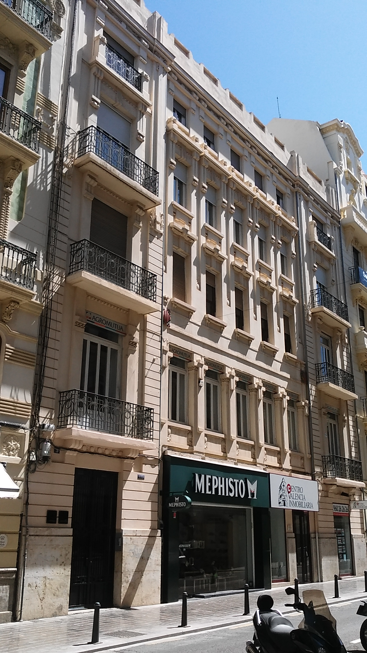 Casa Bigné, en el carrer Peréz Pujol número 5, en Valéncia. Obra modernista de l'arquitecte Demetrio Ribes Marco, 1911.